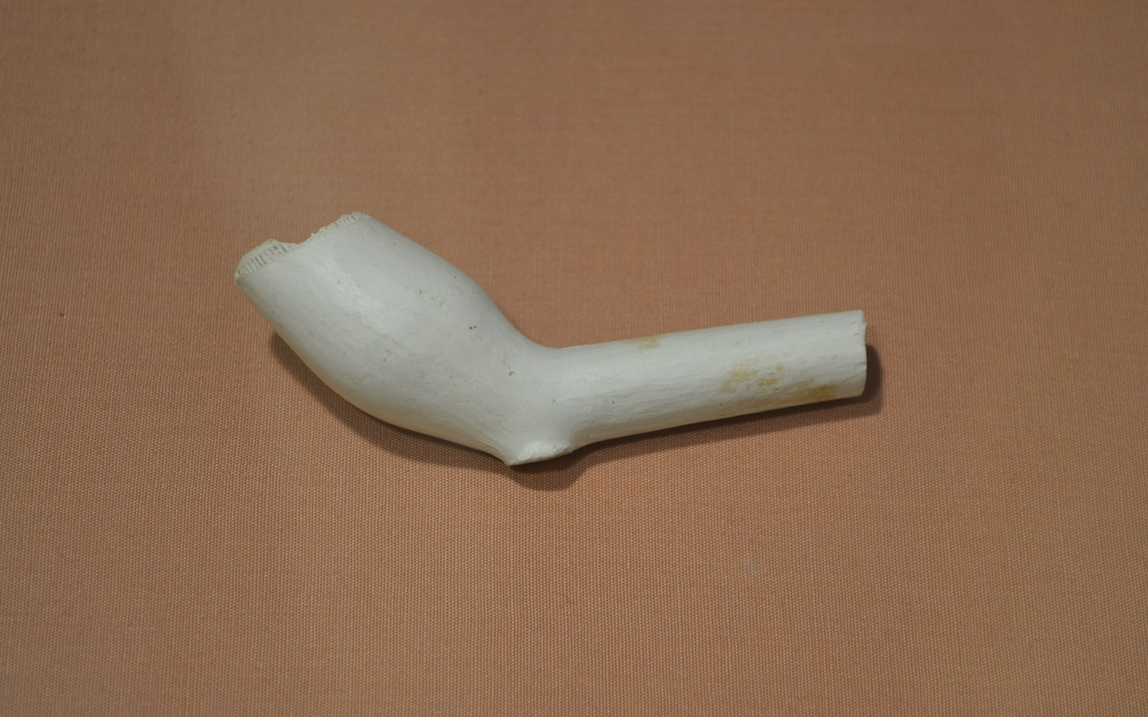 Pipa de fumar tabac, procedent d'Àmsterdam (Holanda). C. 1672-1724,. Alcoy, nucli urbà. Museu Arqueològic Municipal d'Alcoi.